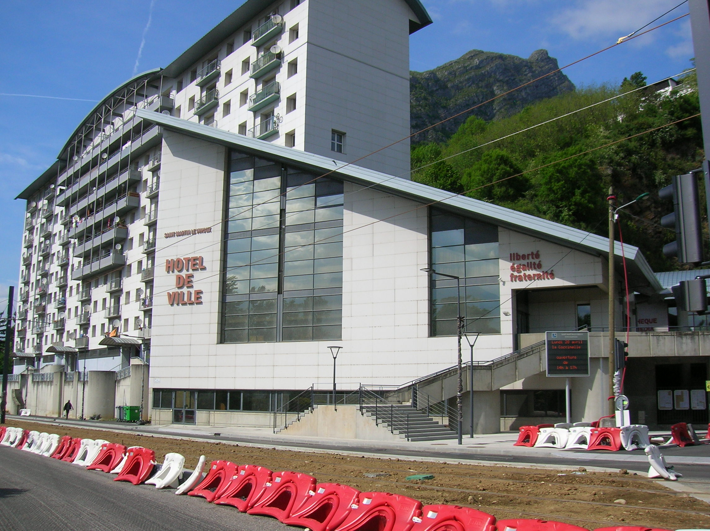 marie de Saint-Martin-le-Vinoux.